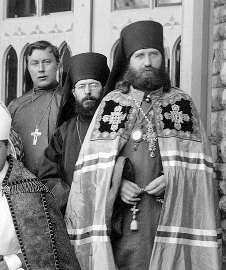 священномученик Иоанн Кочуров, преподобный Севастиан (Дабович) и святитель Тихон (Беллавин)